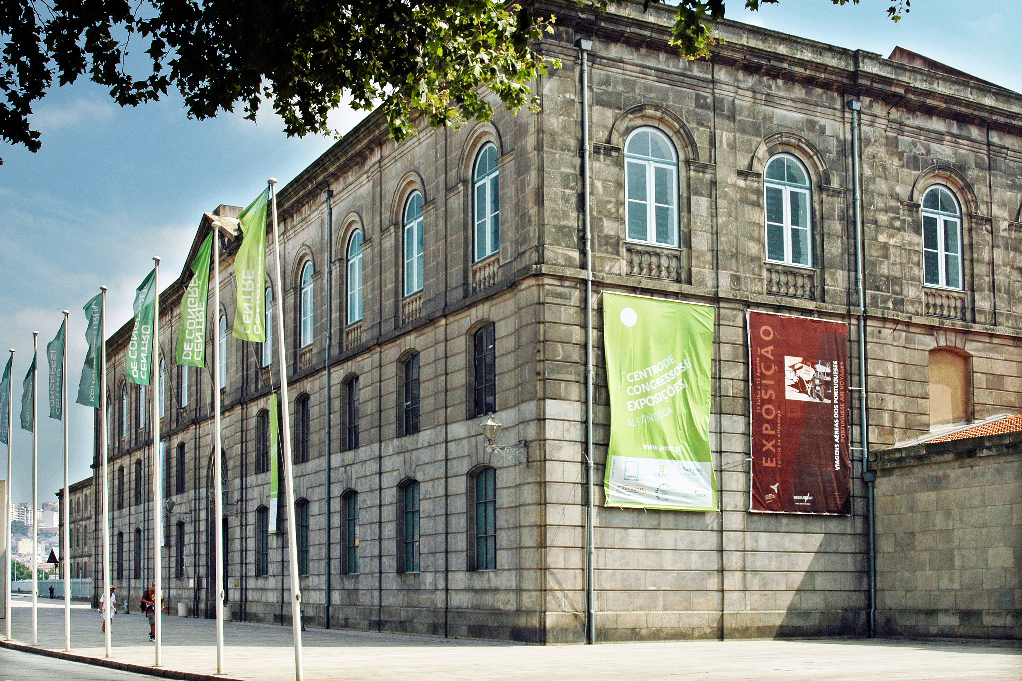 Alfândega Nova - Entrada principal This file was uploaded for Wiki Loves Monuments in Portugal with the unique identifier 70765.